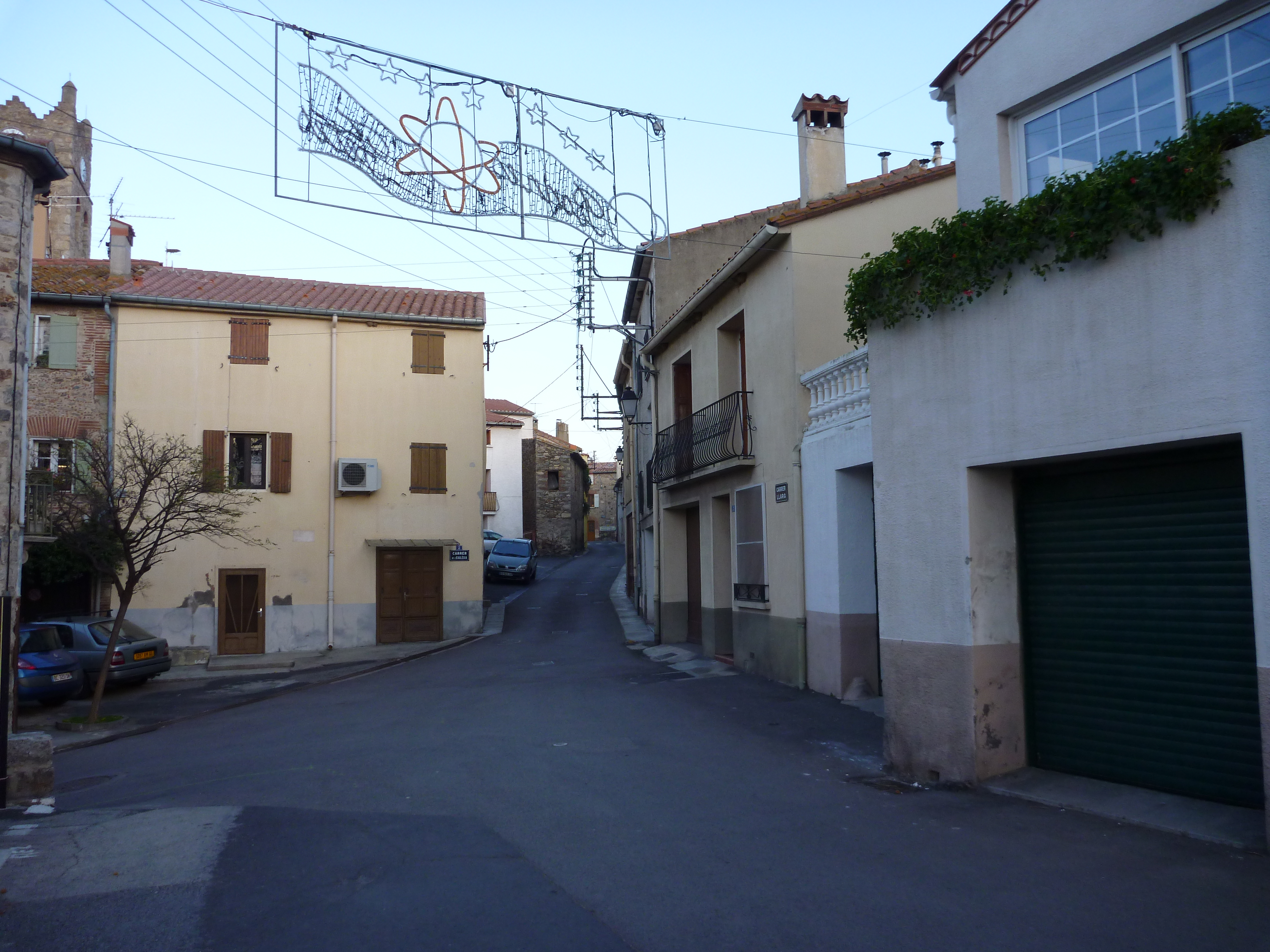 Villelongue-dels-Monts